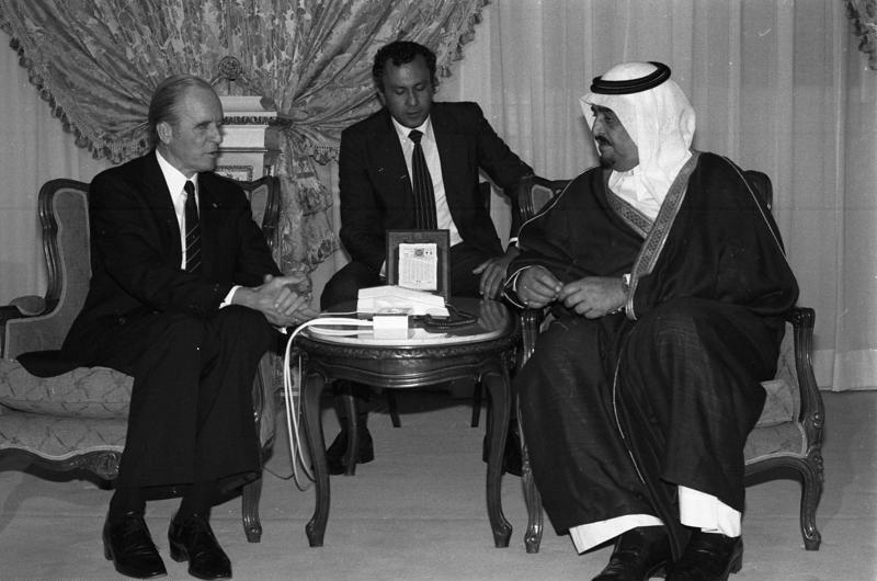 Bundespräsident Carl Carstens macht Kondolenzbesuch bei König Fahd in Saudi-Arabien